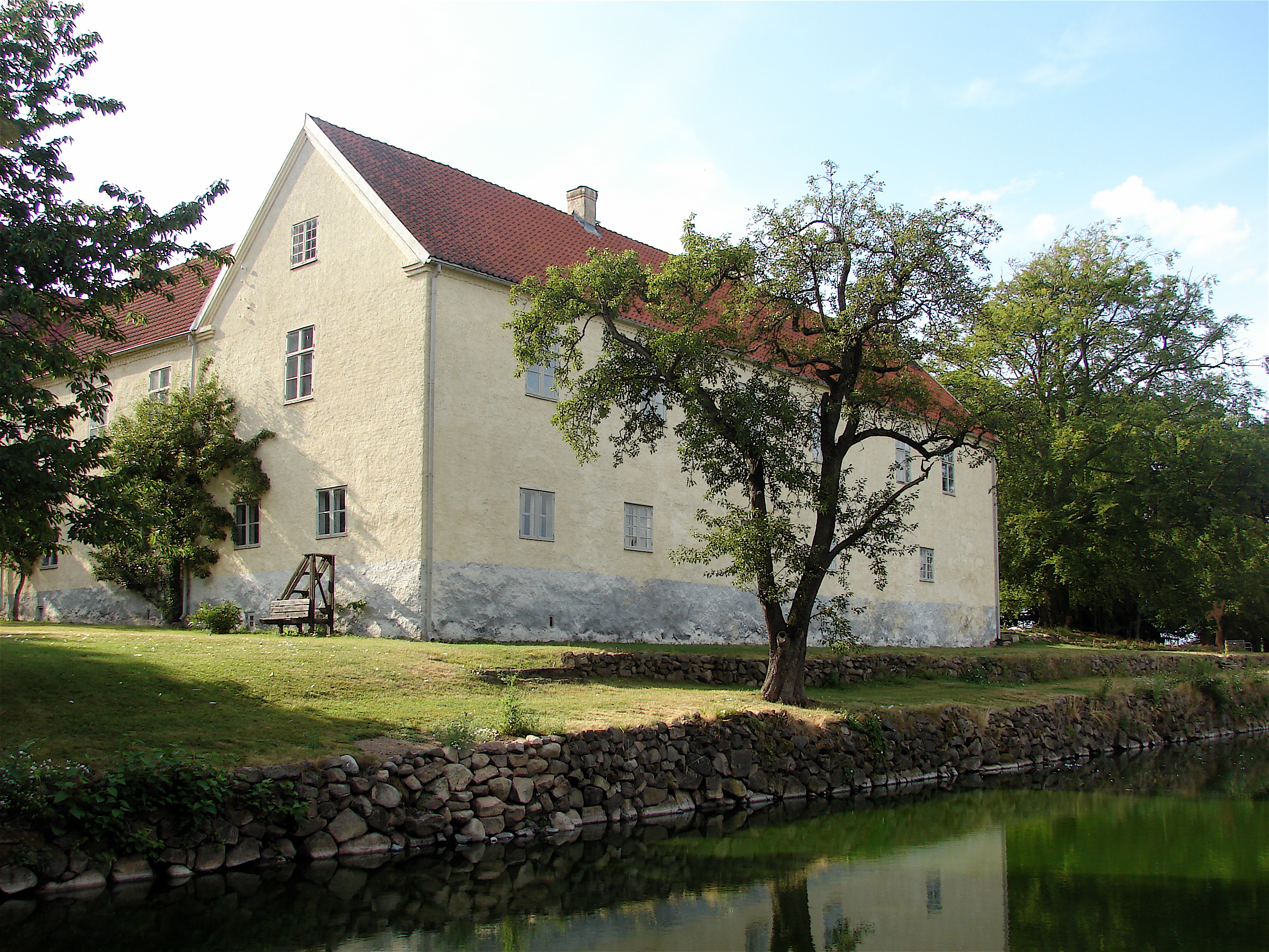 Tommerup med voldgrav, Tommarp Kungsgård, Sverige